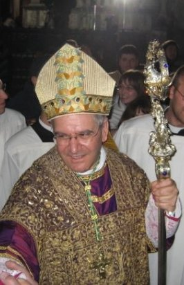 Mons. Beschi Vescovo di Bergamo